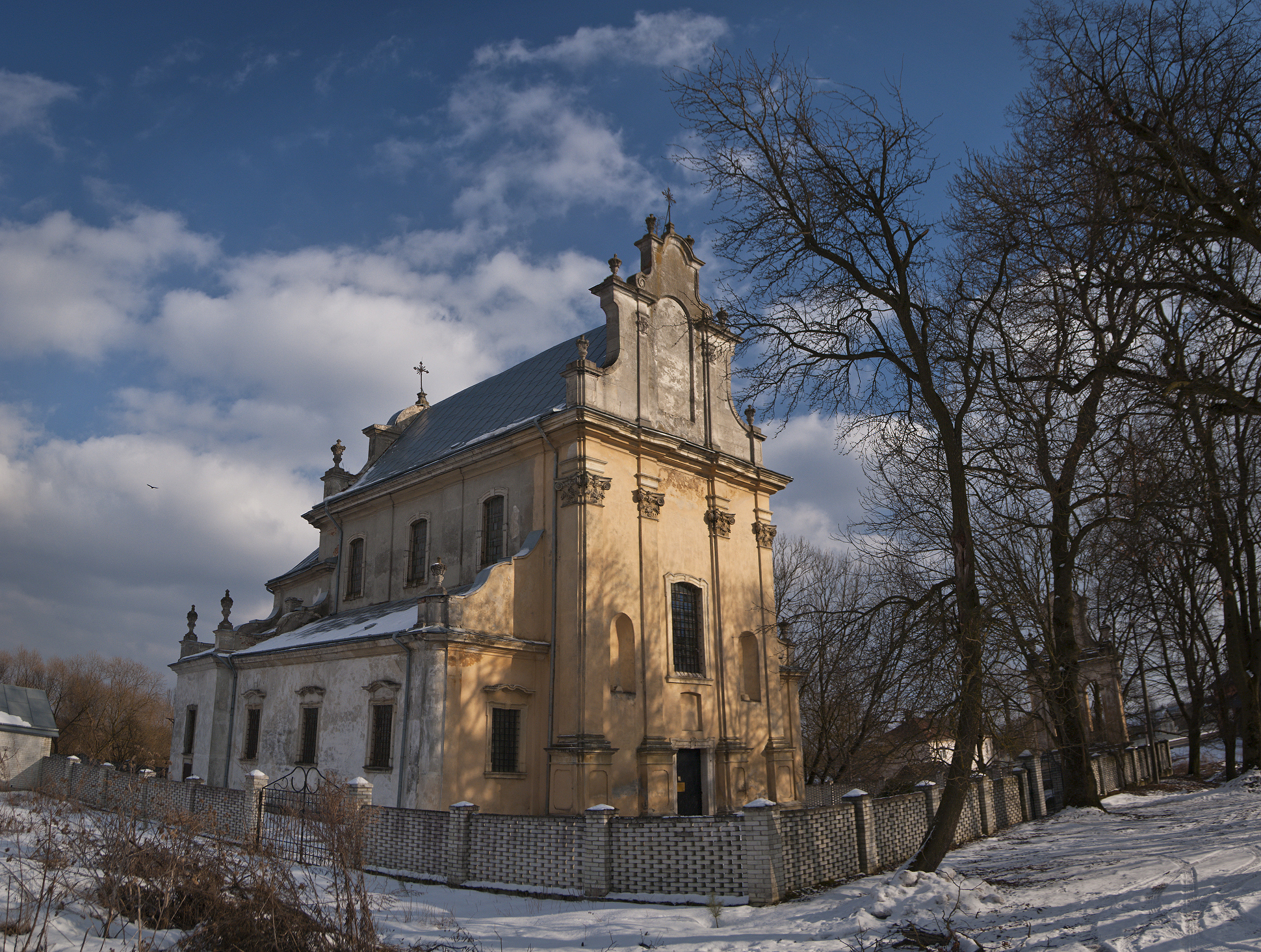 костел Внебовзяття Пресвятої Діви Марії (1626, 1760 рр.) в селі Наварія